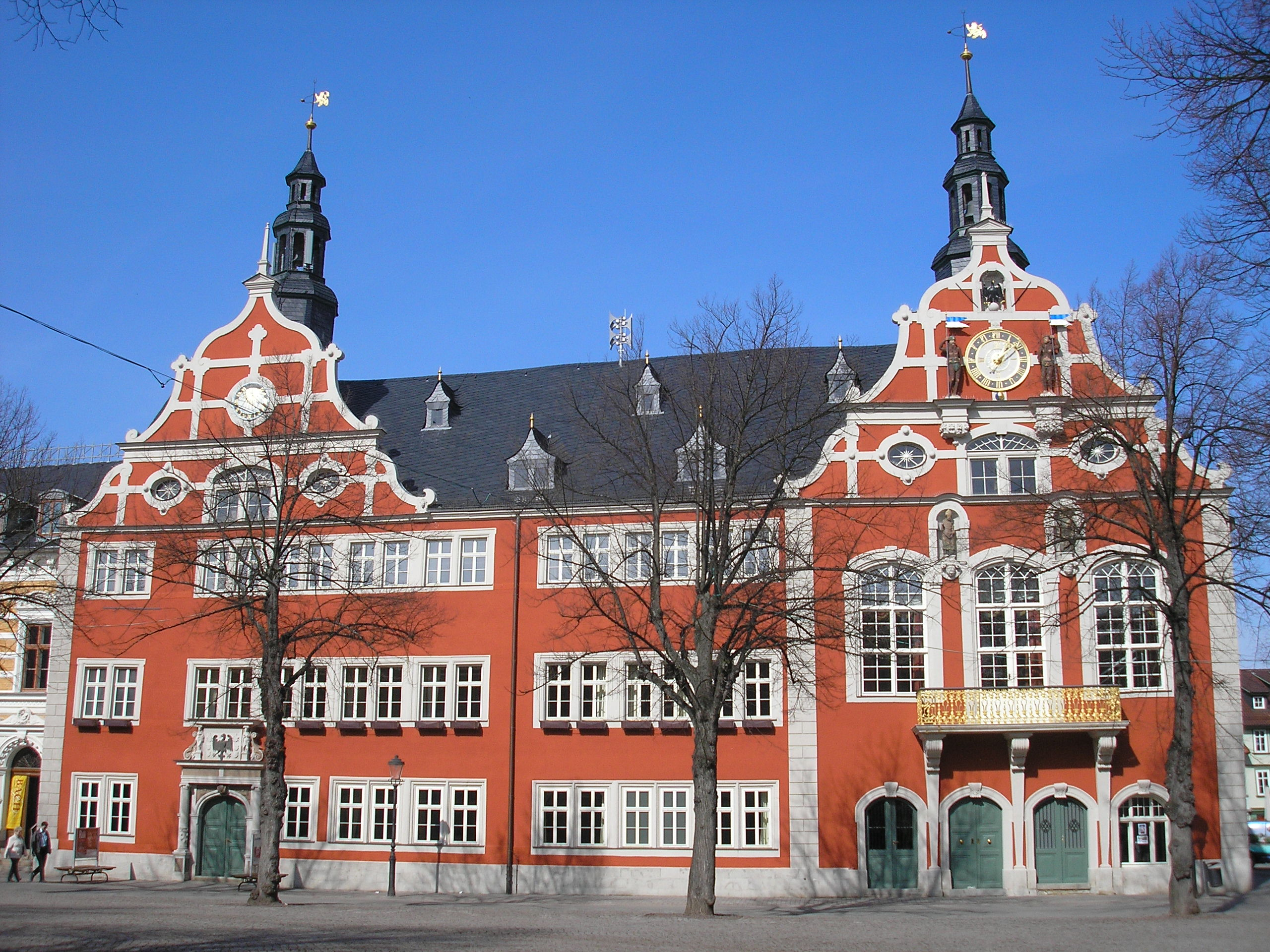 Das Rathaus in Arnstadt (Thüringen).